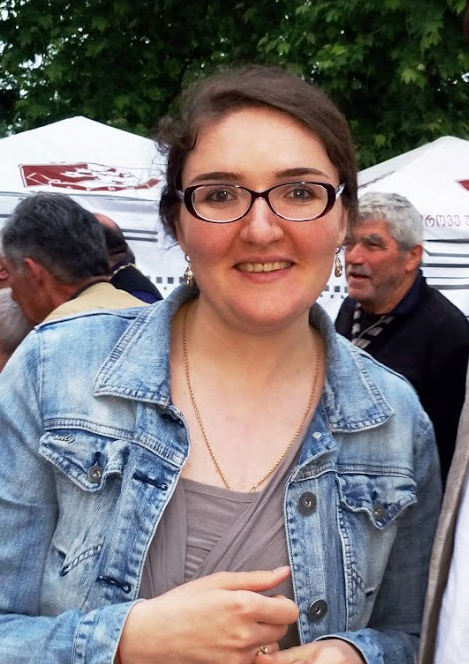 ნანა ძაგნიძე ვანელობის დღესასწაულზე 2017 წელს